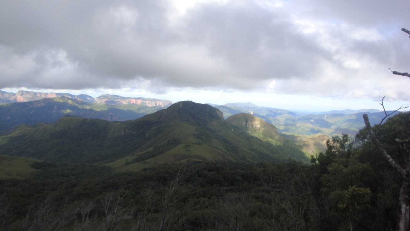 Florida, Bolivia